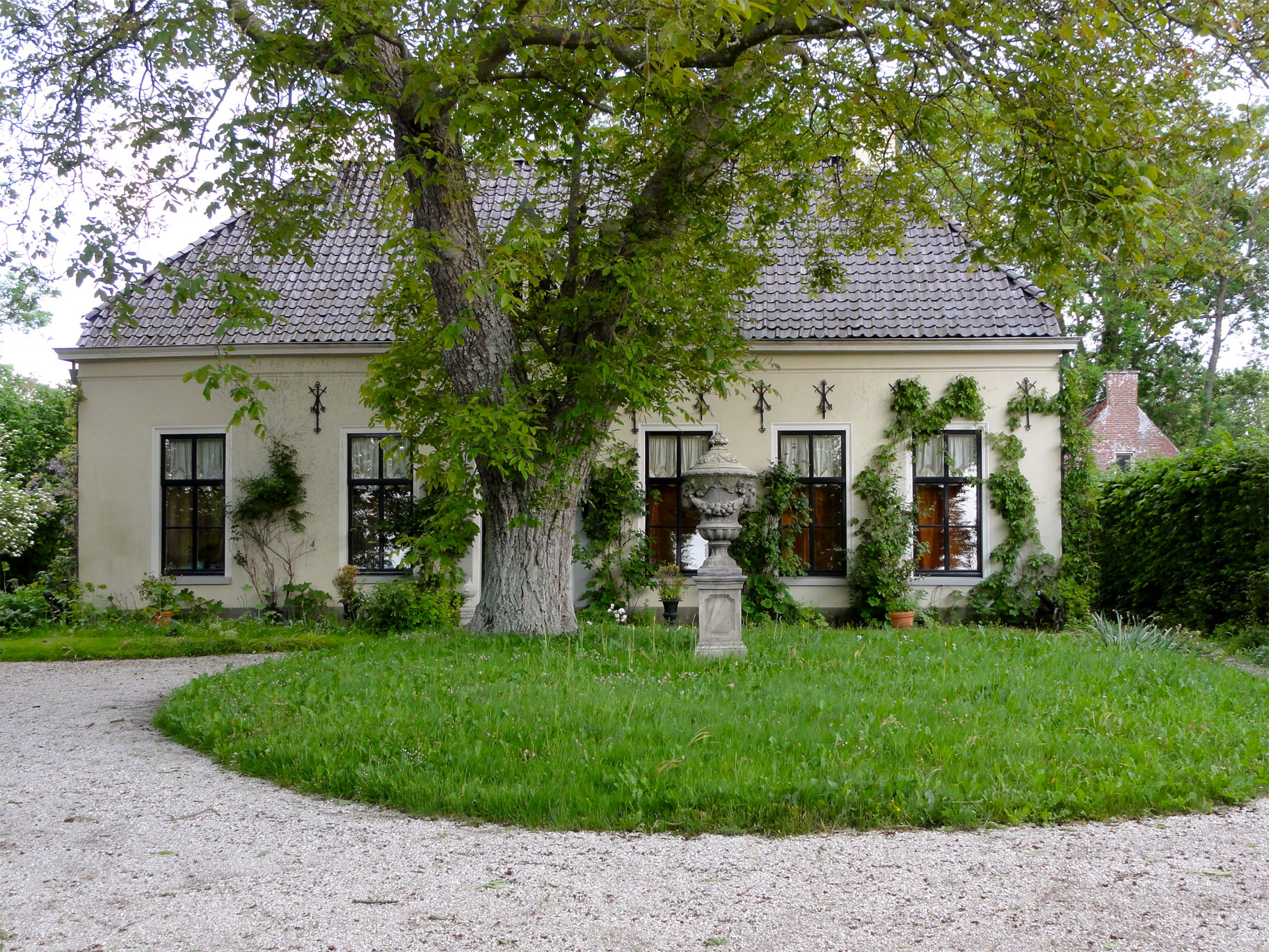 De Harstastate